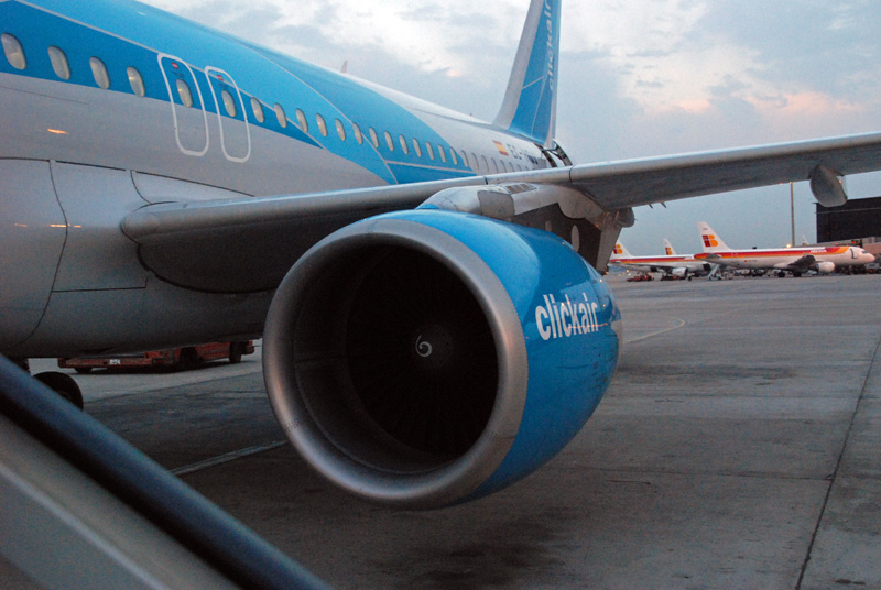 Reactor de un avión en El Prat (Barcelona)